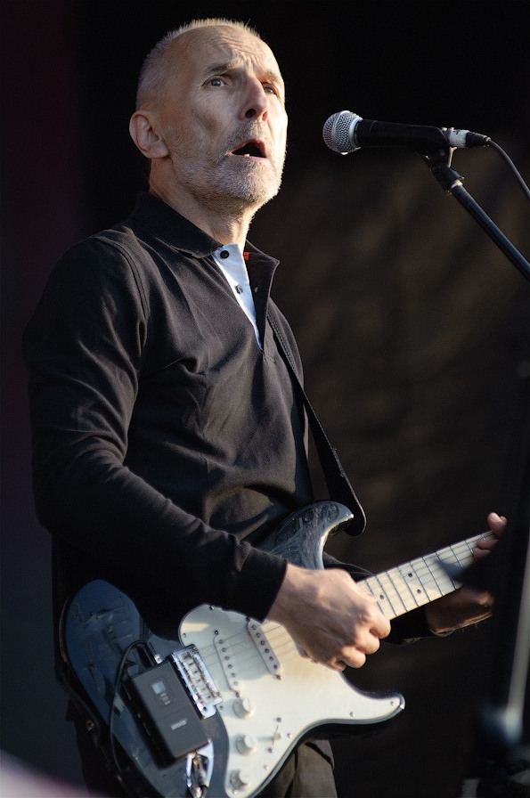 Пётр Мамонов на фестивале "Рок над Волгой" 2011